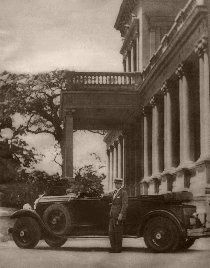 O milionário brasileiro Carlos Guinle, com seu Chrysler Imperial 80, nos jardins de seu palácio no bairro de Botafogo, Rio de Janeiro.